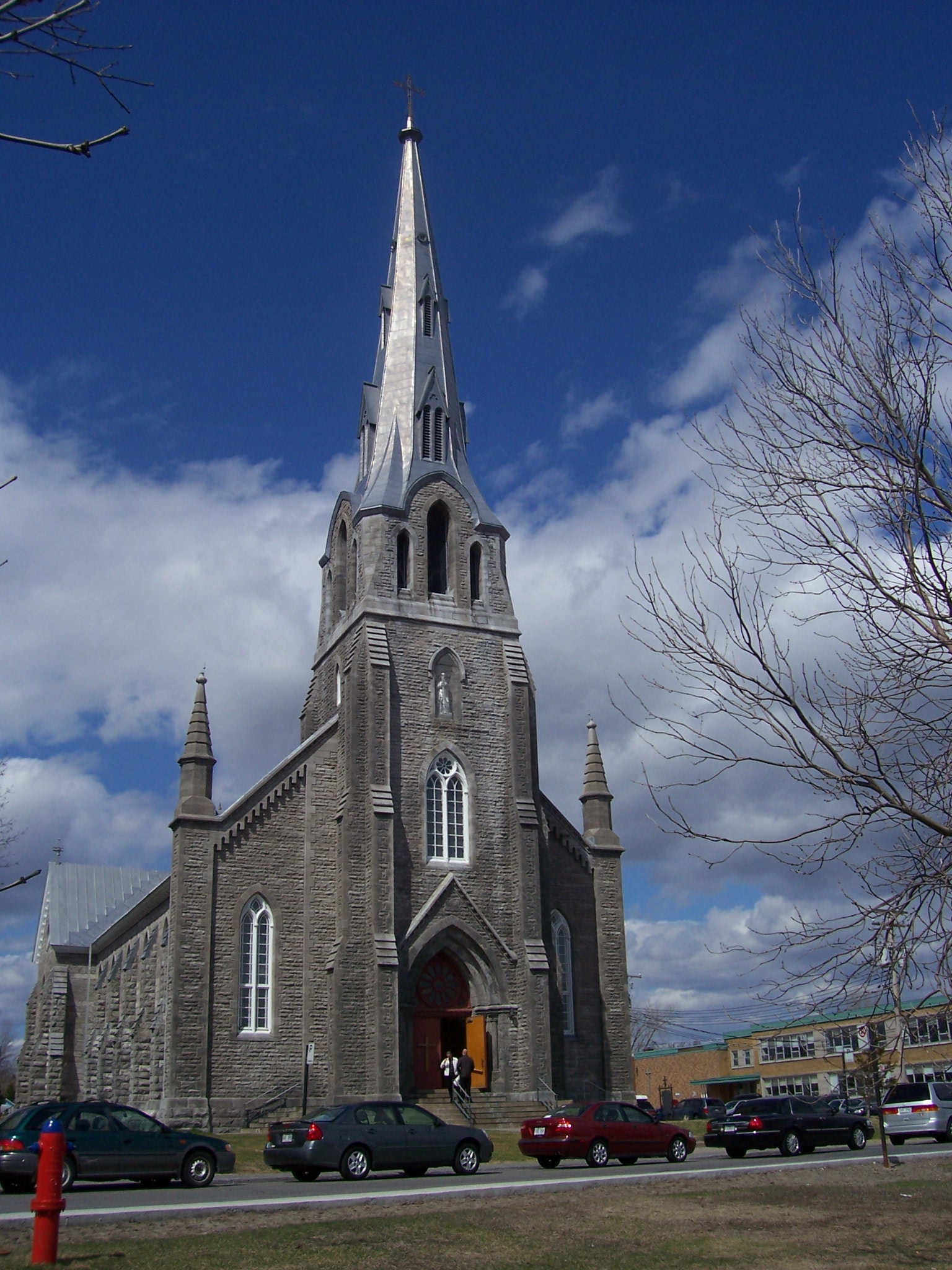 Église Saint-Joachim de Pointe-Claire, à Pointe-Claire sur l'île de Montréal (Québec)